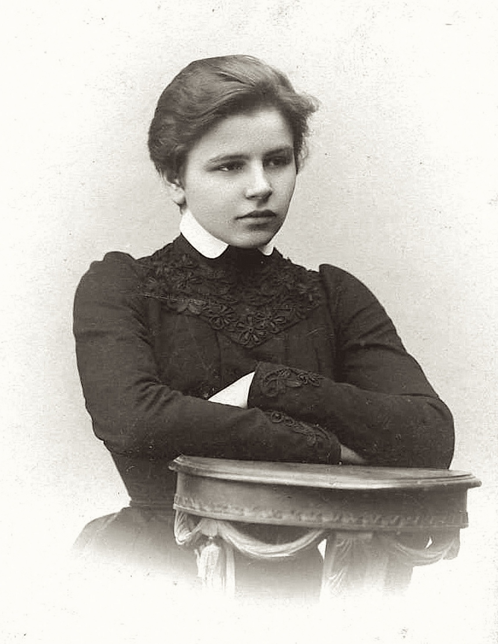 Ирина (Рена) Анатольевна Бонч-Осмоловская